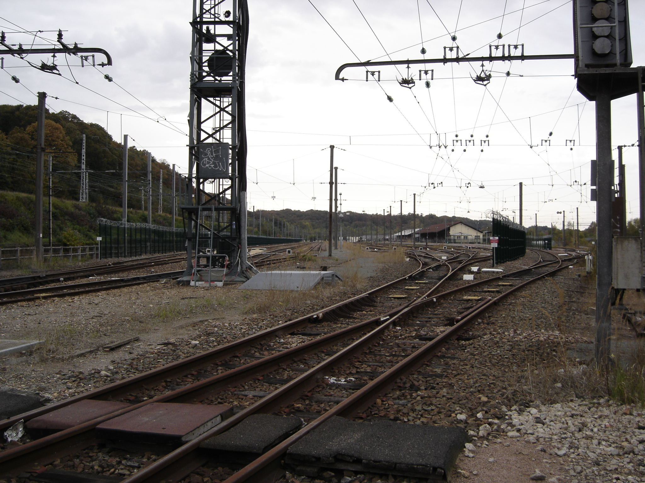 Voies de triage sur le site ferroviaire de Versailles-Matelots.